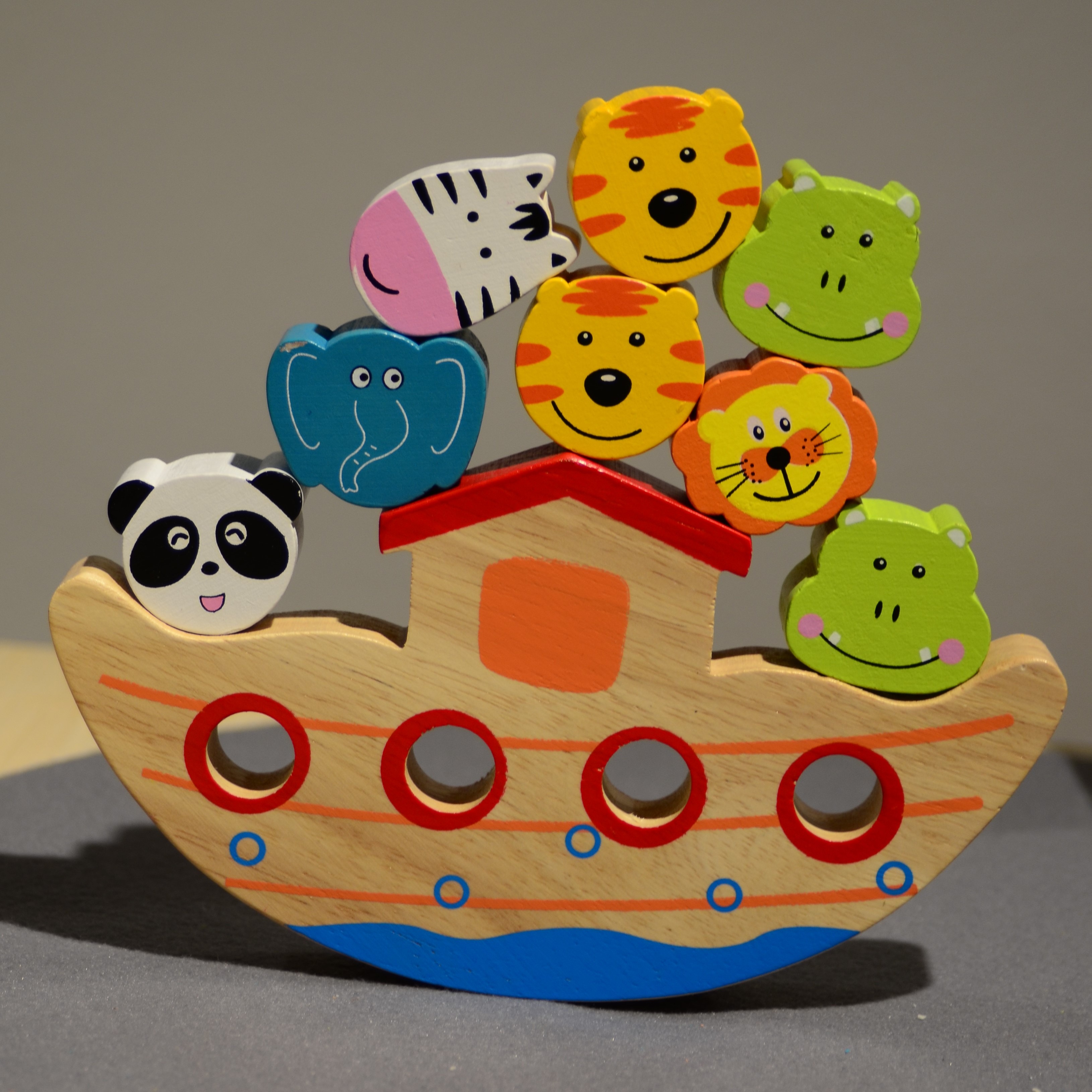 Bibelmuseum Stuttgart (Bibliorama) - Arche als Spielzeug